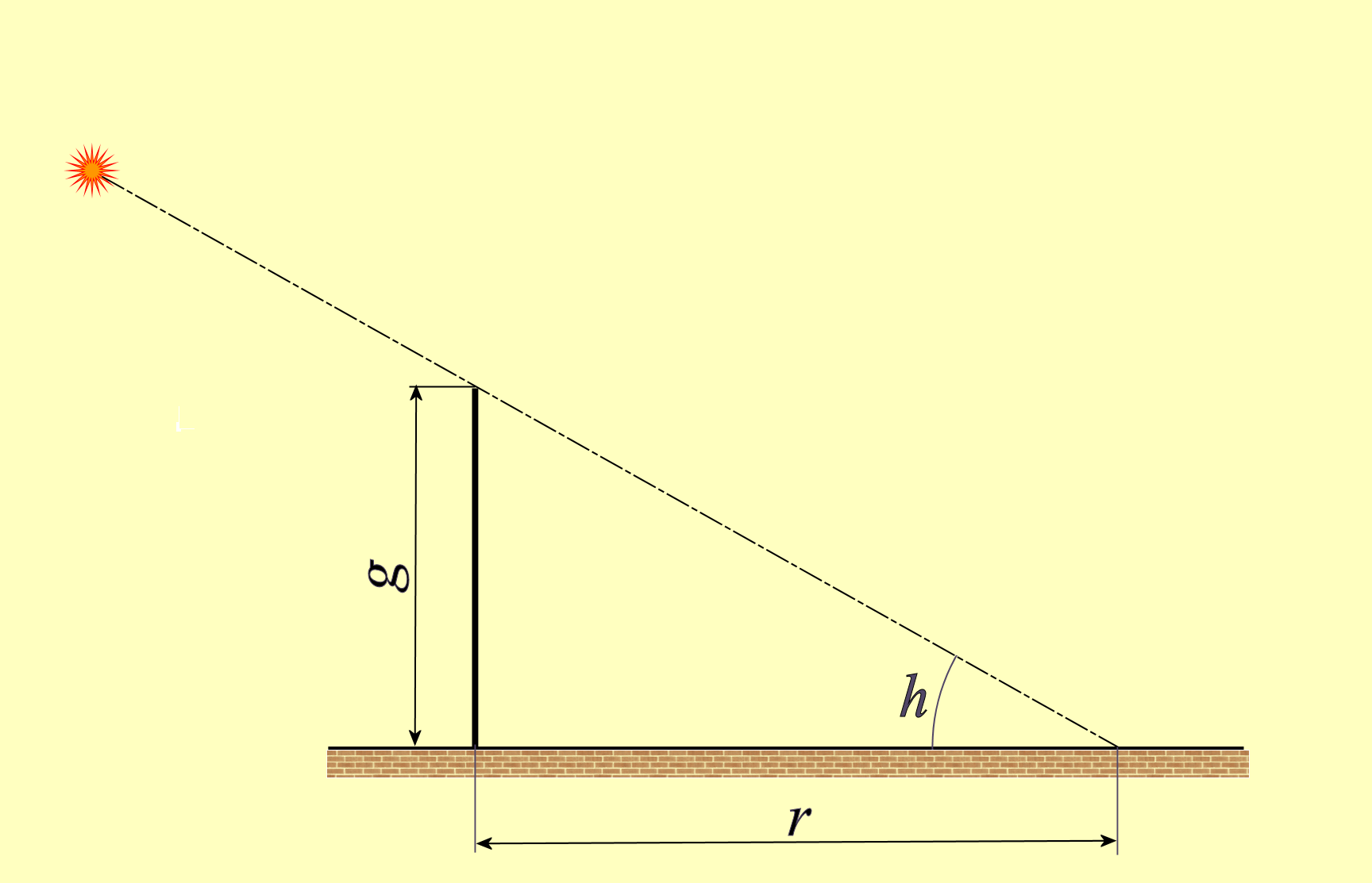 Hauteur du Soleil mesurée au gnomon.